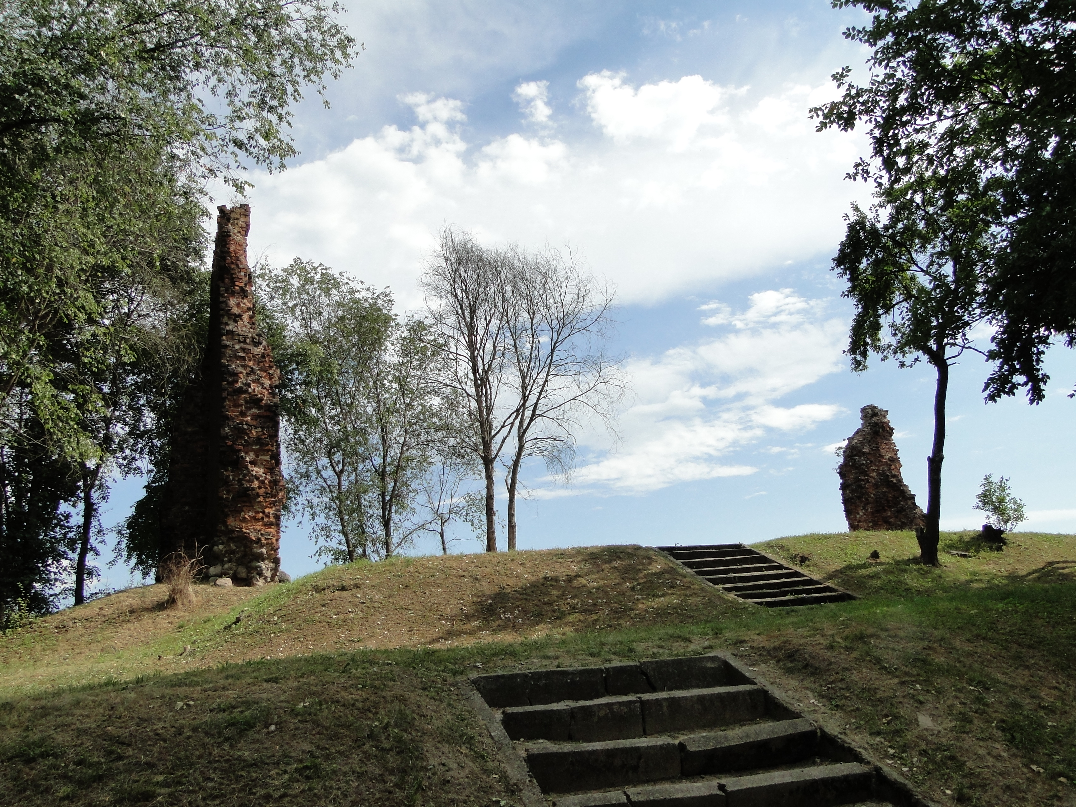 Zamek w Drawnie